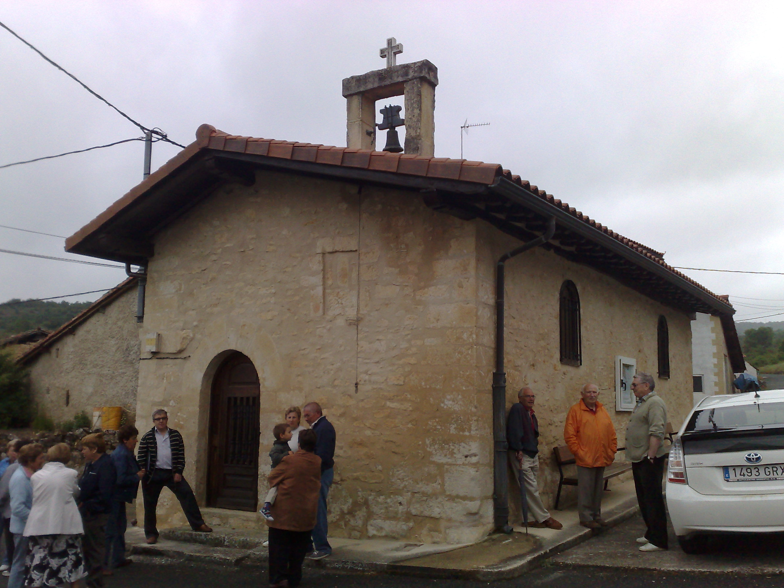 Ospakizuna Santa Ana baselizan, Zekuiano, Arraia-Maeztu, Araba, Euskal Herria.